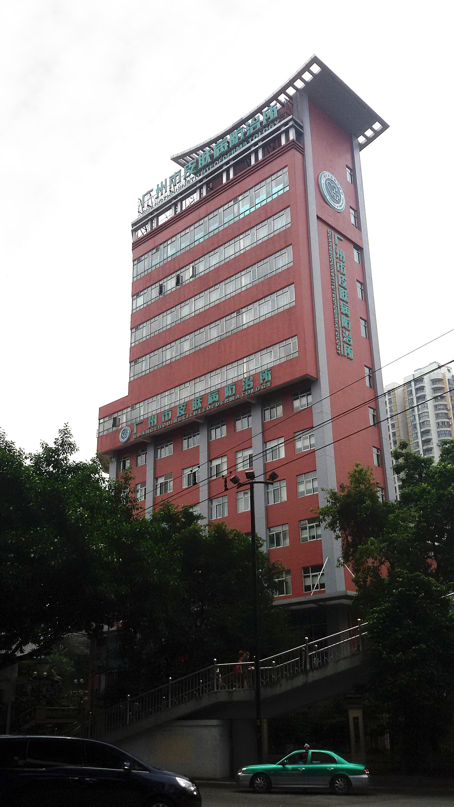 粵語: 广州市皮肤病防治所